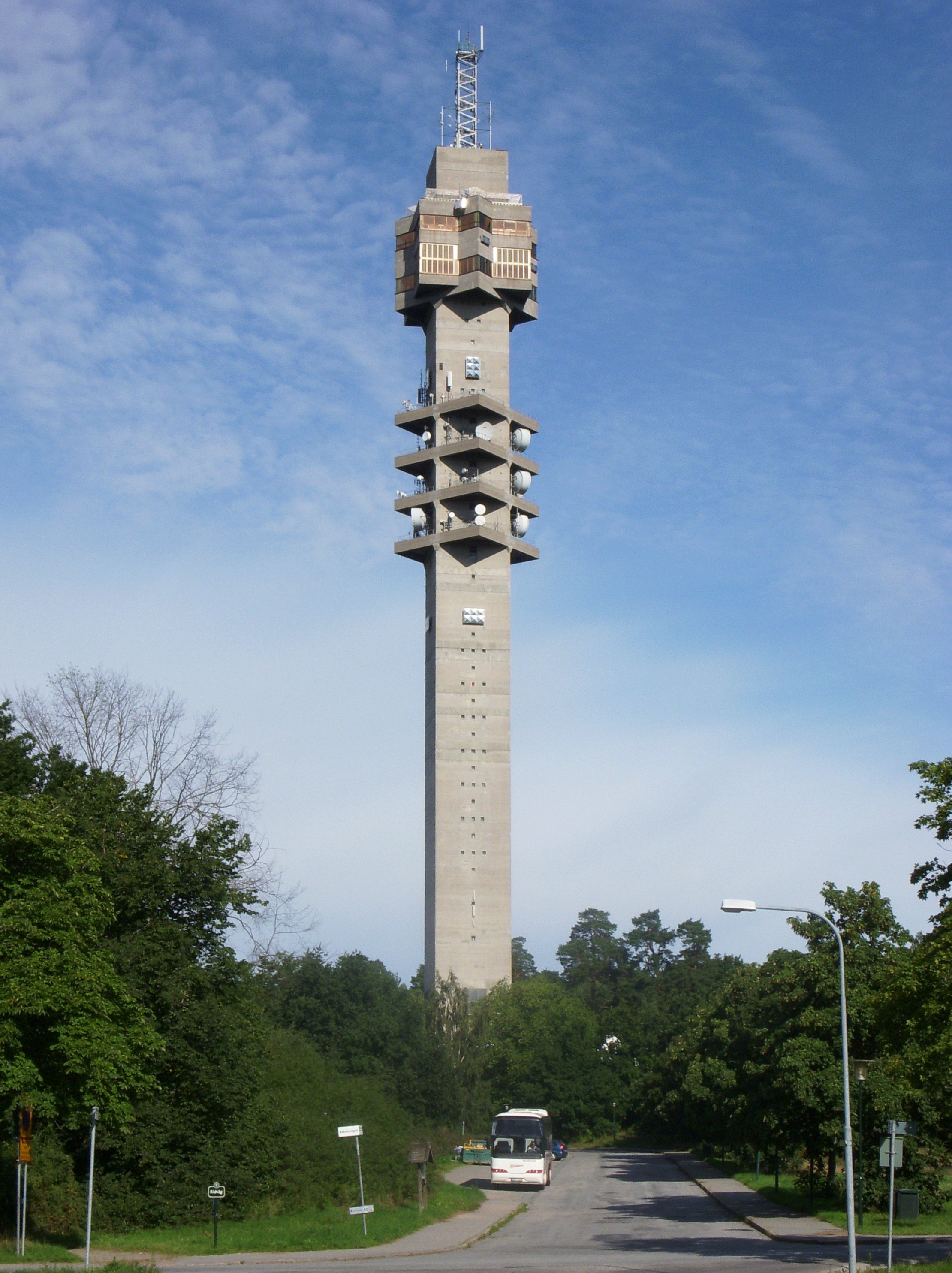 Kaknästornet